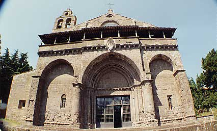 chiesa